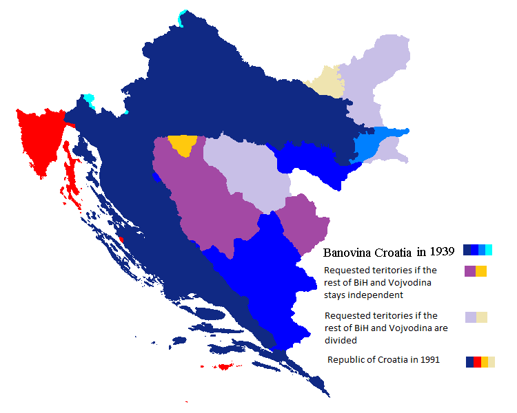 Pregovori po , stavljeni na ovu pozadinu